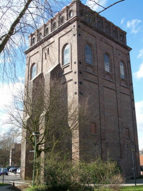 Der Malakow-Turm der Zeche Julius-Phillipp, Bochum